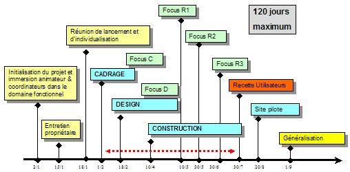 RAD120Jours